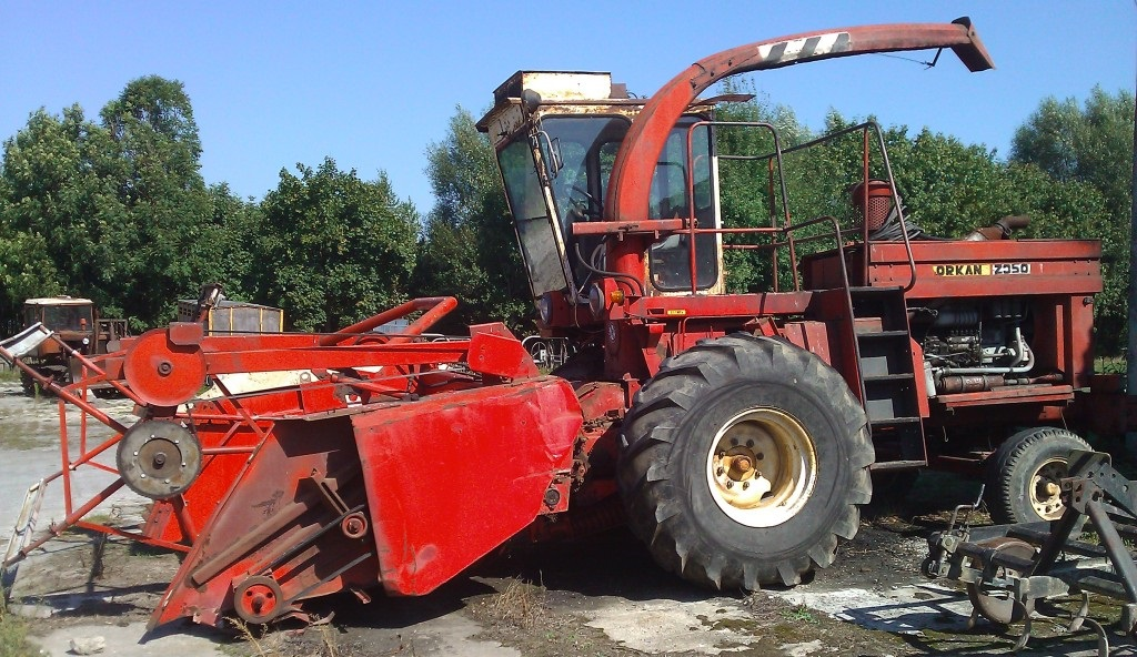 Orkan Z350 - widok z lewej